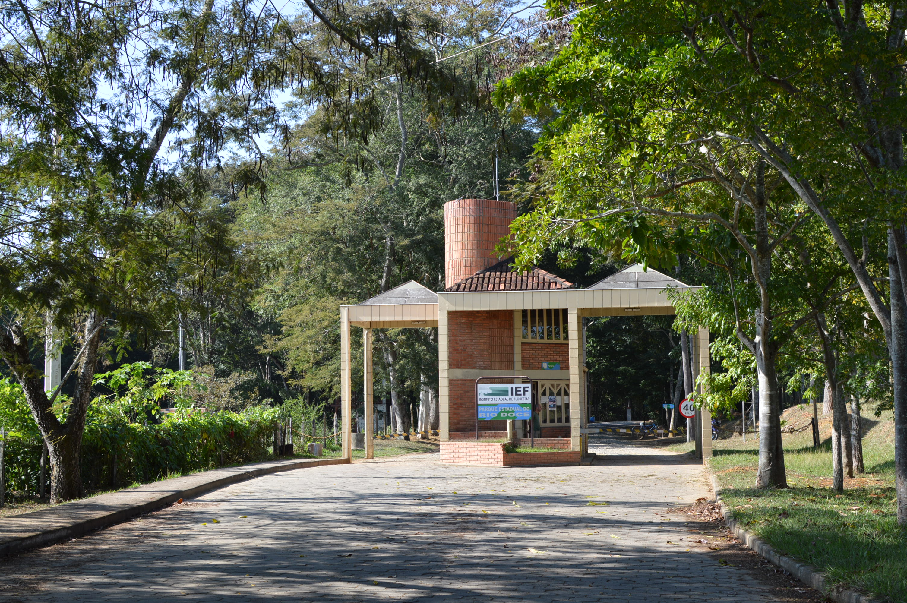 Entrrada do parque